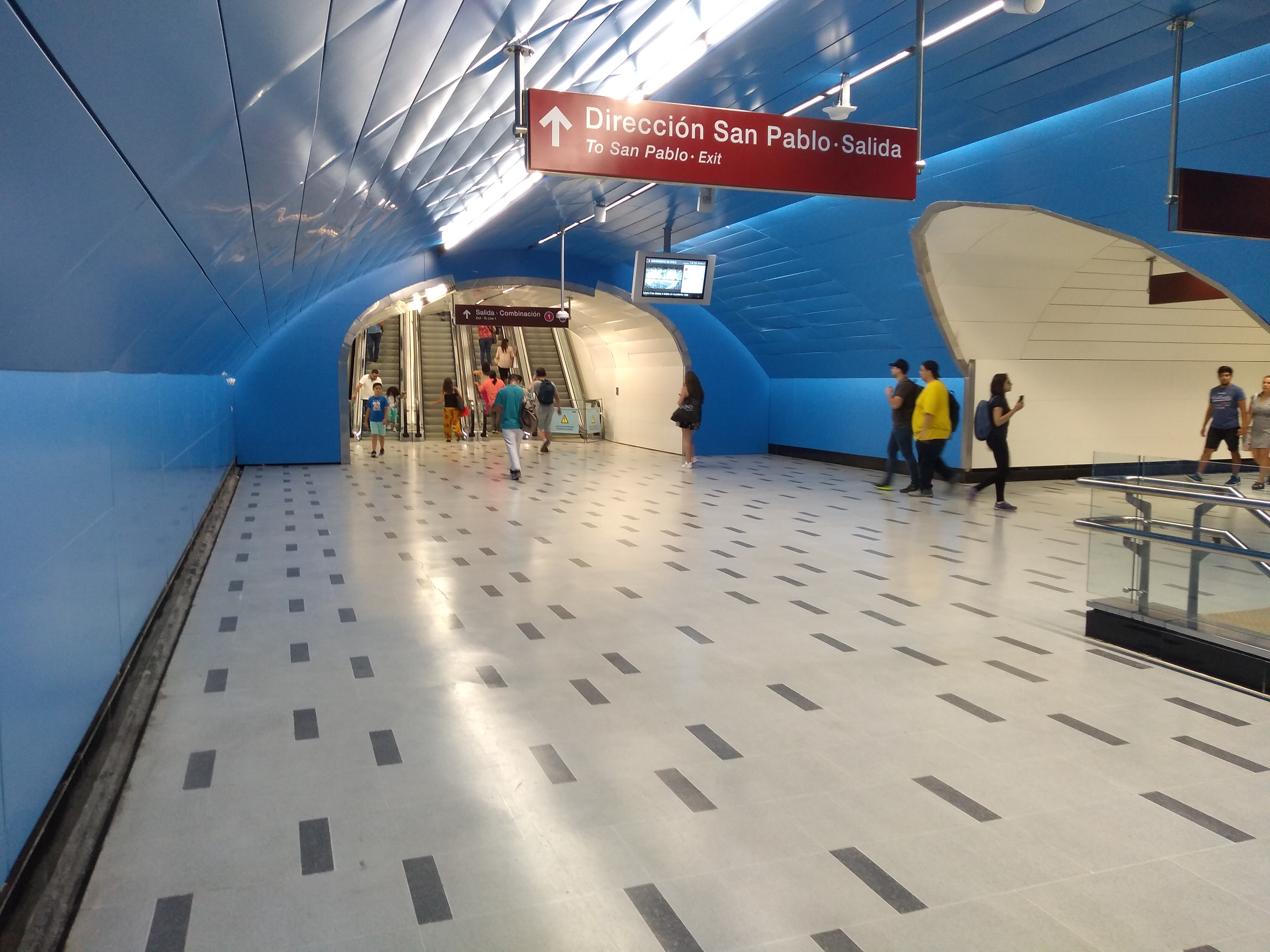 Nivel de combinación Lineas 1 y 3